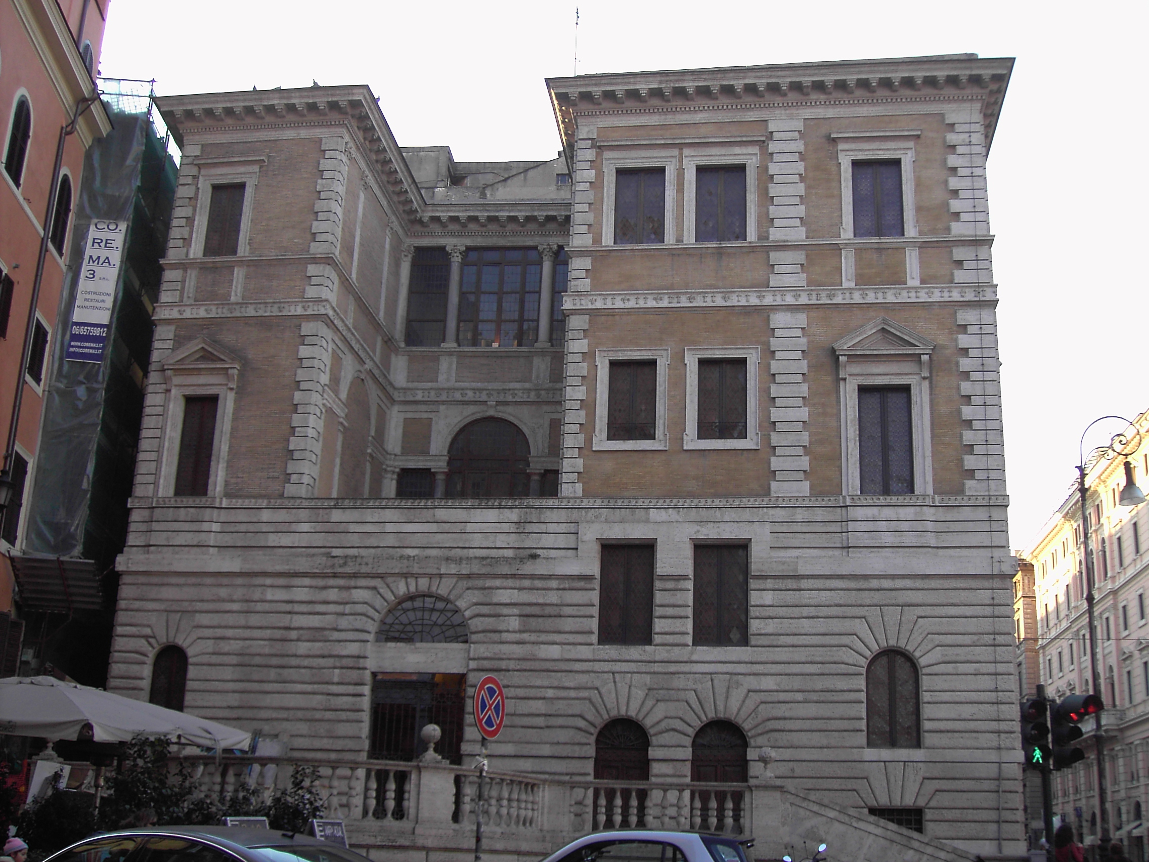 Roma, Palazzetto Le Roy o Piccola Farnesina, sede del Museo Barracco